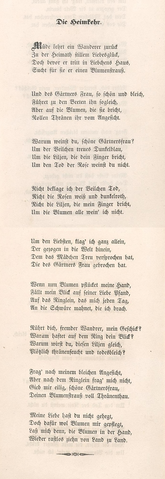 Lebrecht Dreves: Die Heimkehr (1839), Vorlage der Küchenmoritat Müde kehrt ein Wandersmann zurück